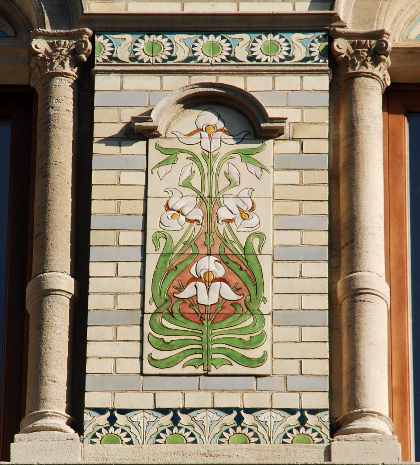 Grande Maison de Blanc, rue du Marché aux Poulets, 32-34 à Bruxelles (Belgique), céramiques de Privat Livemont